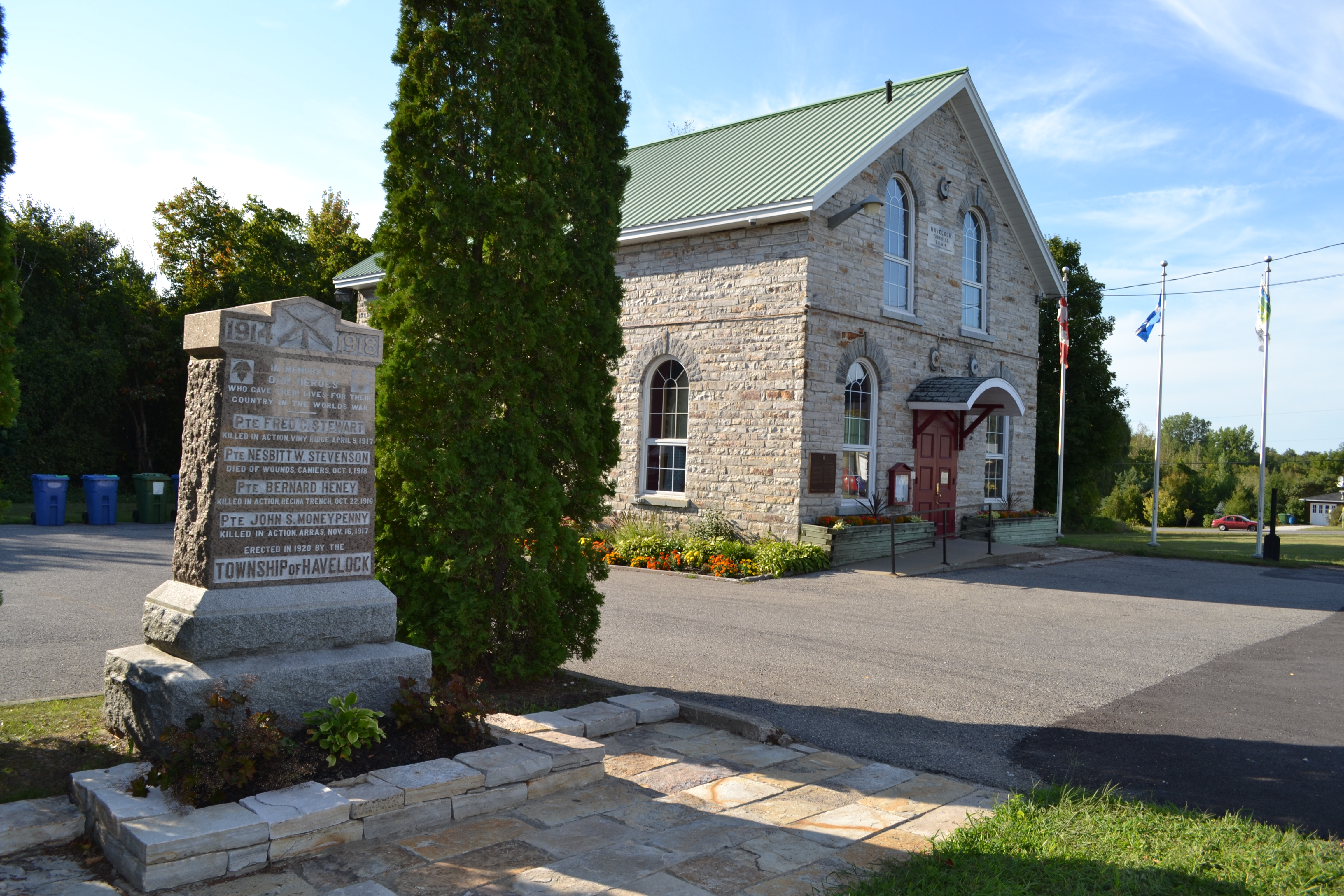 Le lieu historique national du Canada de la Mairie-de-Havelock, un bâtiment en pierre abritant une salle unique s’élevant sur deux étages servant de mairie, a été construit en 1868.